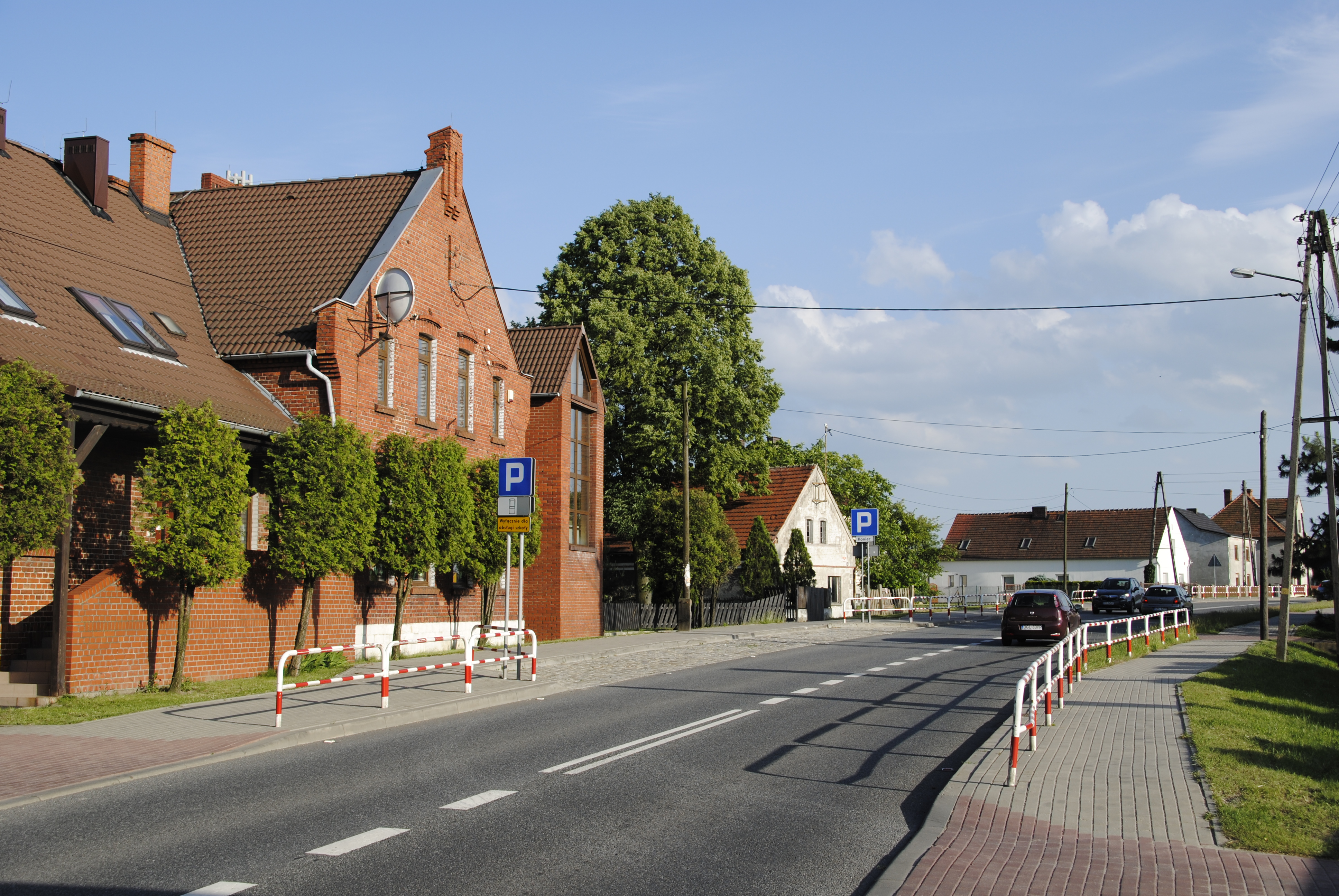 Landstraße DK45 inBoguschütz Kreis Oppeln